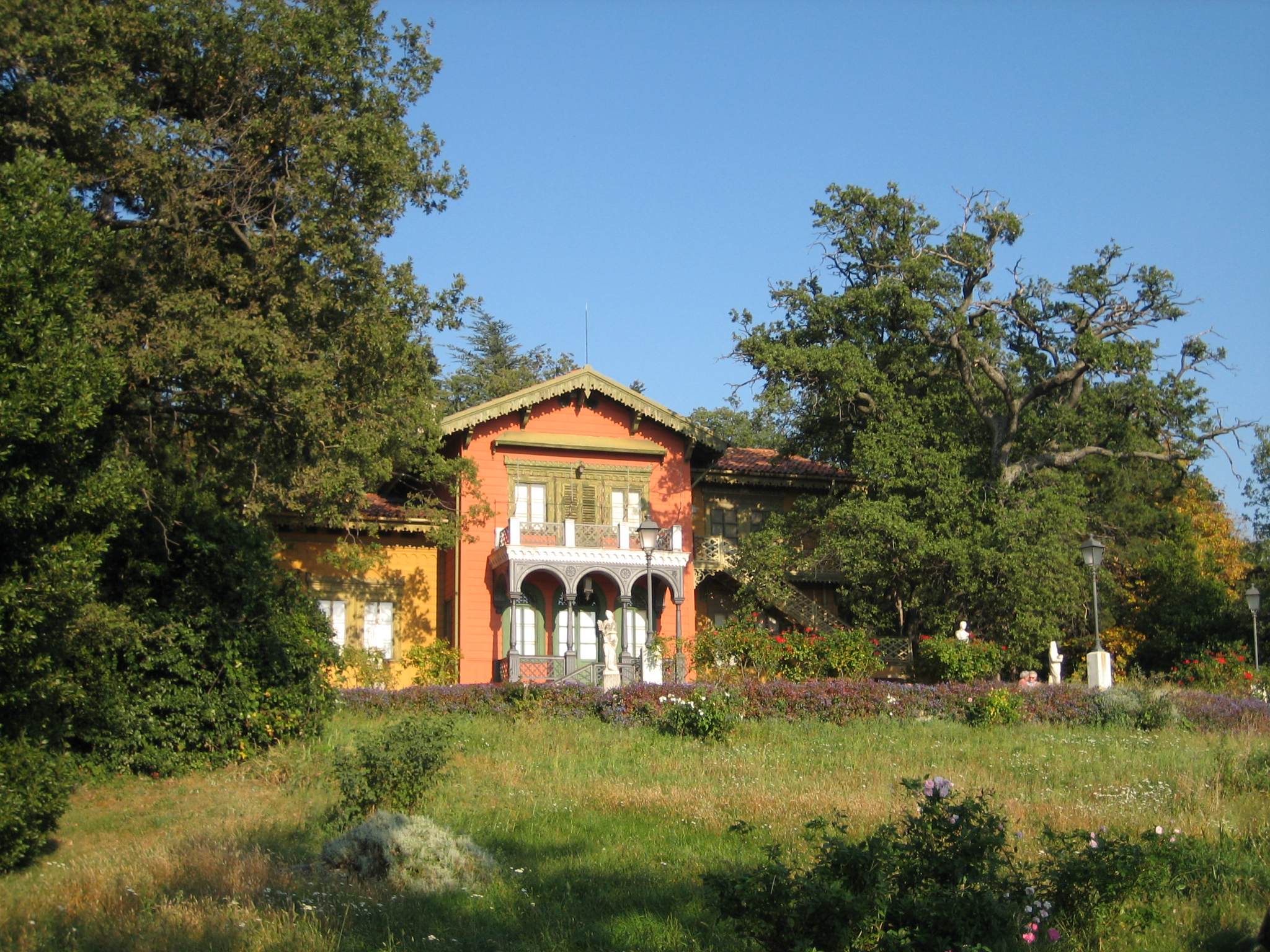 Villa Revoltella in Chiadino, a district of Trieste